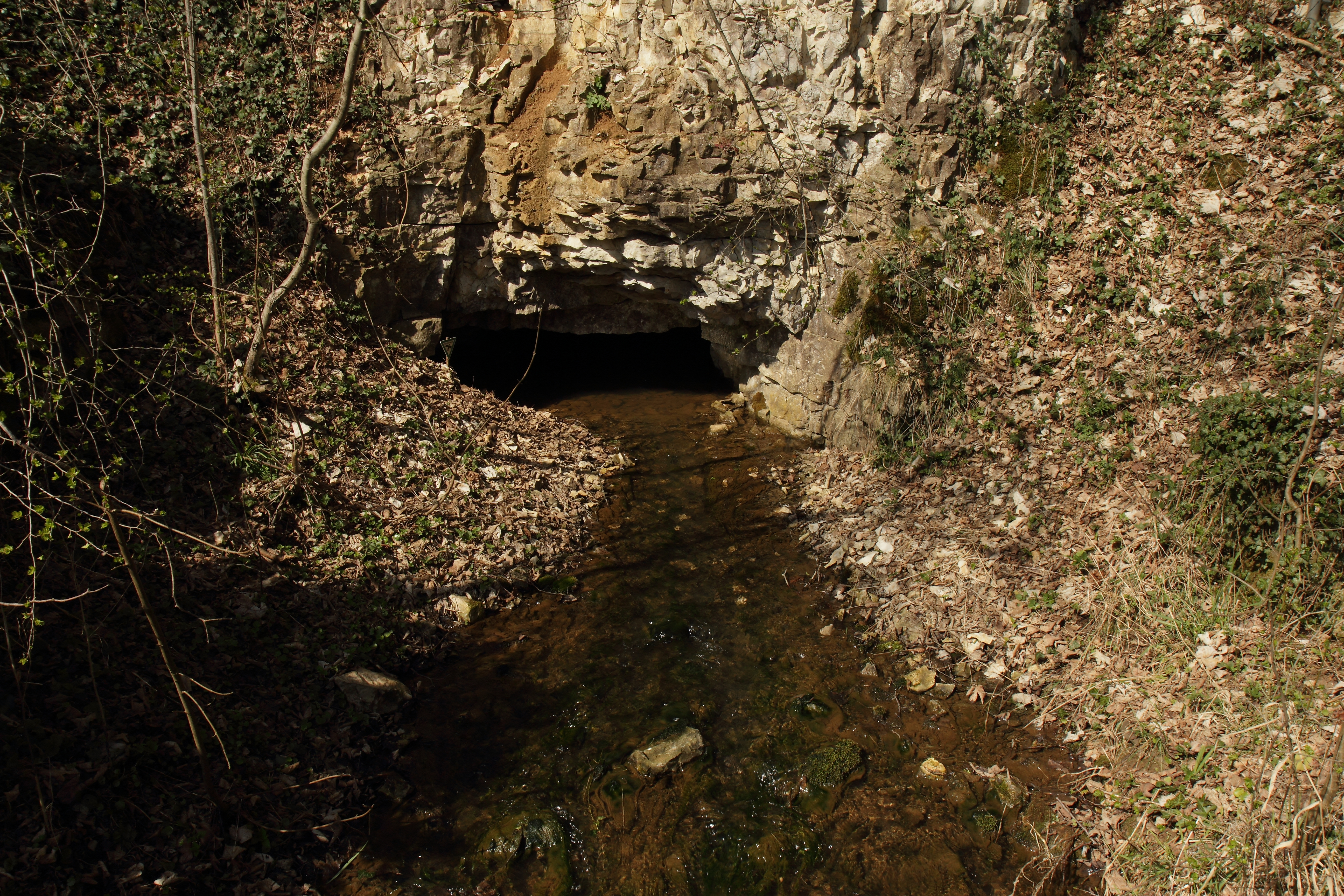 Austritt der Pegnitz aus der Wasserbergquellgrotte D 85a im Wasserberg